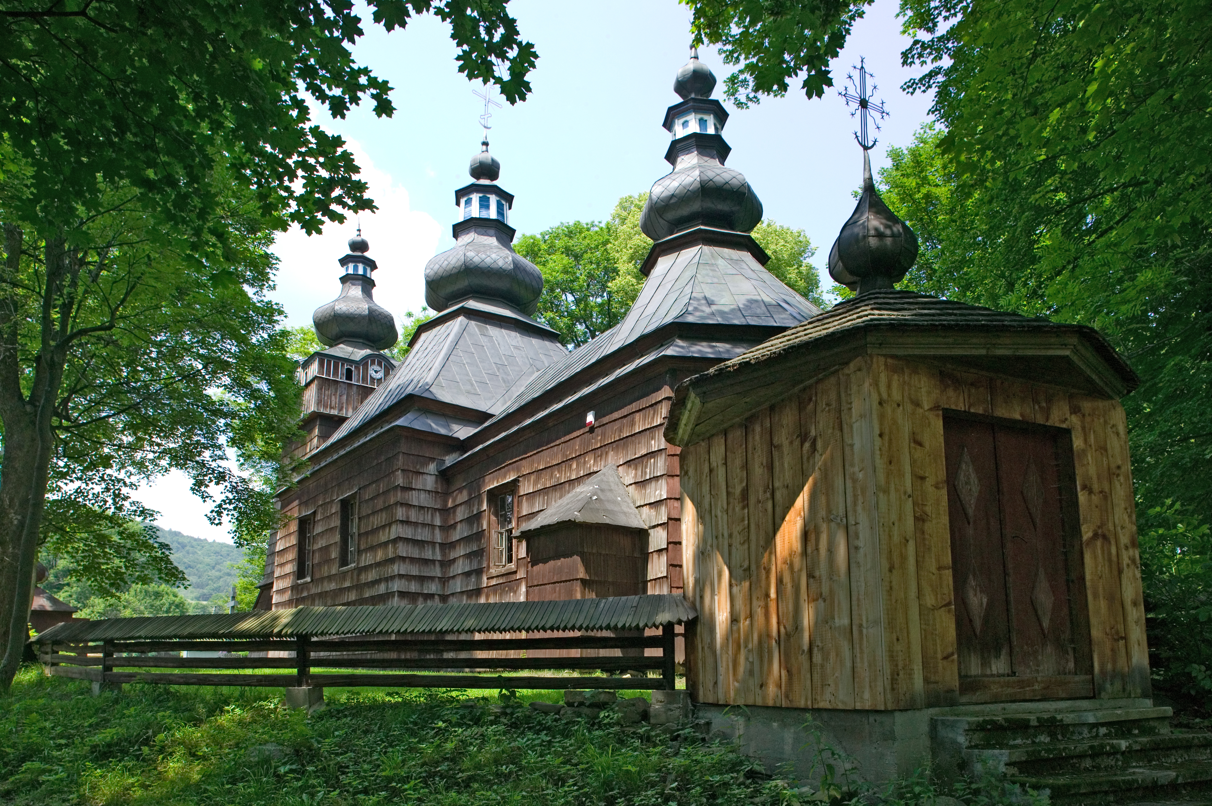 Hańczowa, Cerkiew prawosławna pod wezwaniem Opieki Matki Bożej